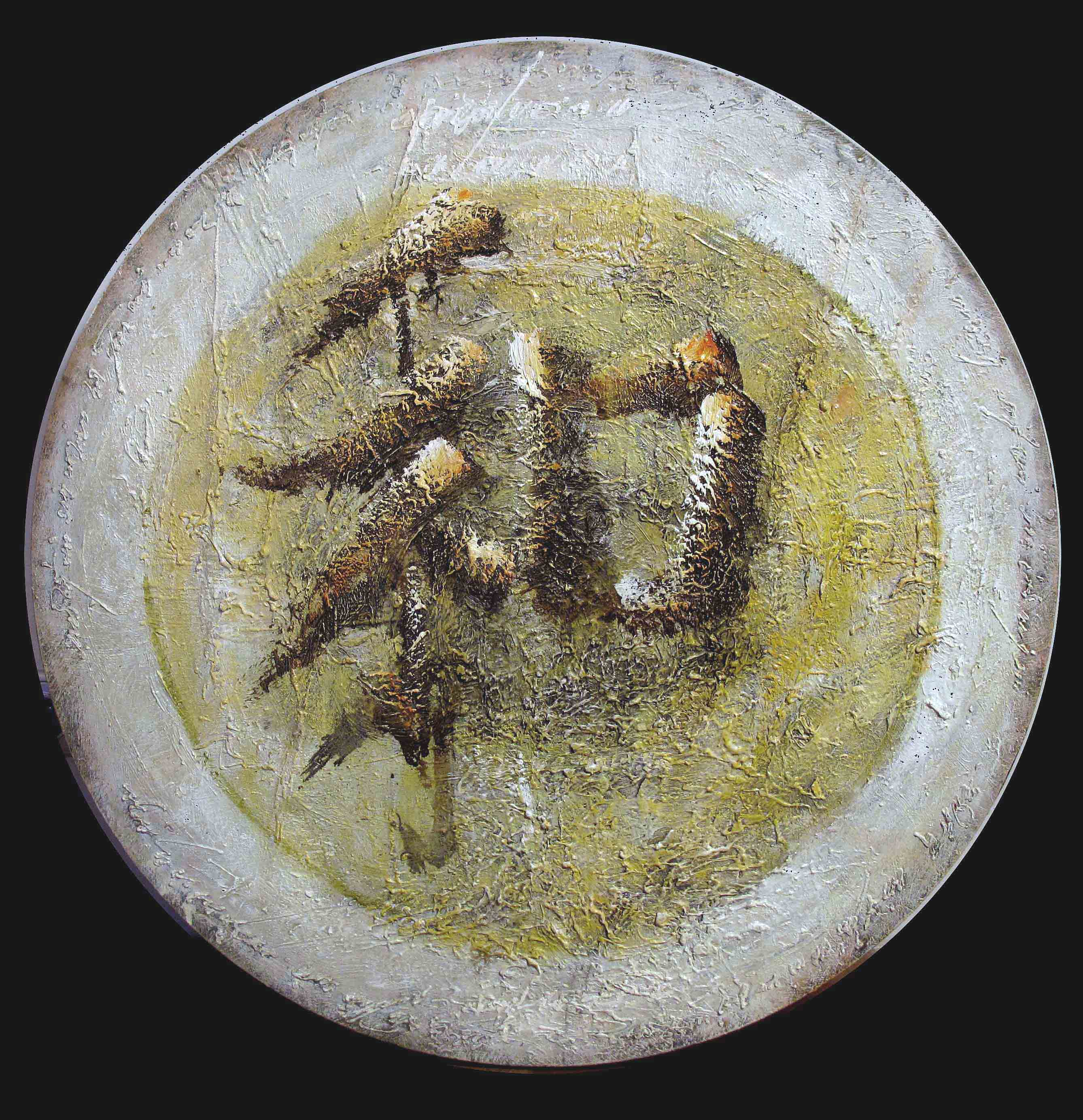 HARMONIJA. Aliejus, drobė. 80 cm. 2005-2010 m. 2676 × 2766